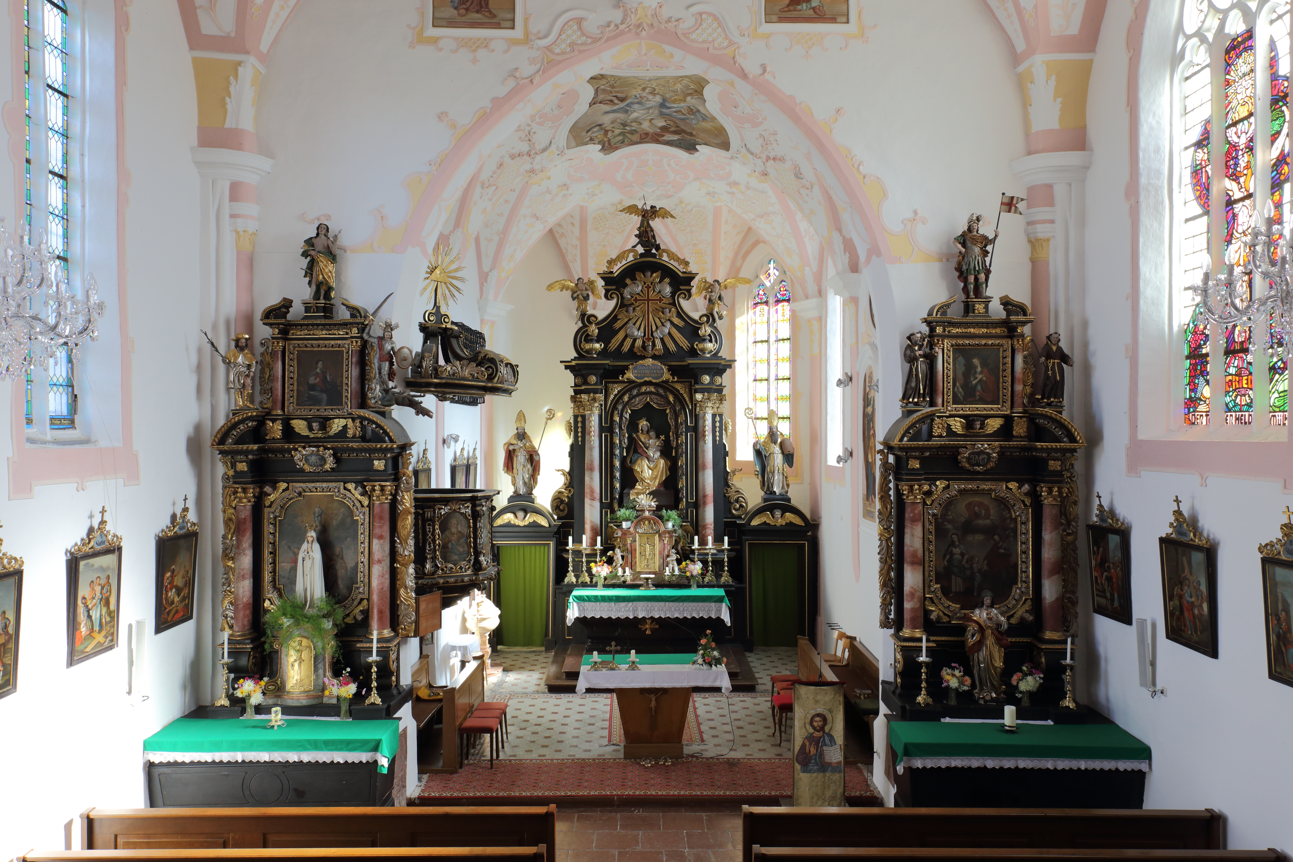 Der Hochaltar und die Seitenaltäre der katholischen Pfarrkirche Mariä Himmelfahrt in der oberösterreichischen Gemeinde Mühlheim am Inn. Im zweiten Viertel des 18. Jahrhunderts wurde an beiden gotischen Gewölben (Langhaus, Chor) die Rippen entfernt und man verzierte das Gewölbe mit Fresken sowie Stuck. Der Hochaltar (vermutlich Anfang des 19. Jahrhunderts), die beiden Seitenaltäre (um 1670/80) und die Kanzel (um 1720) haben barocke Formen.